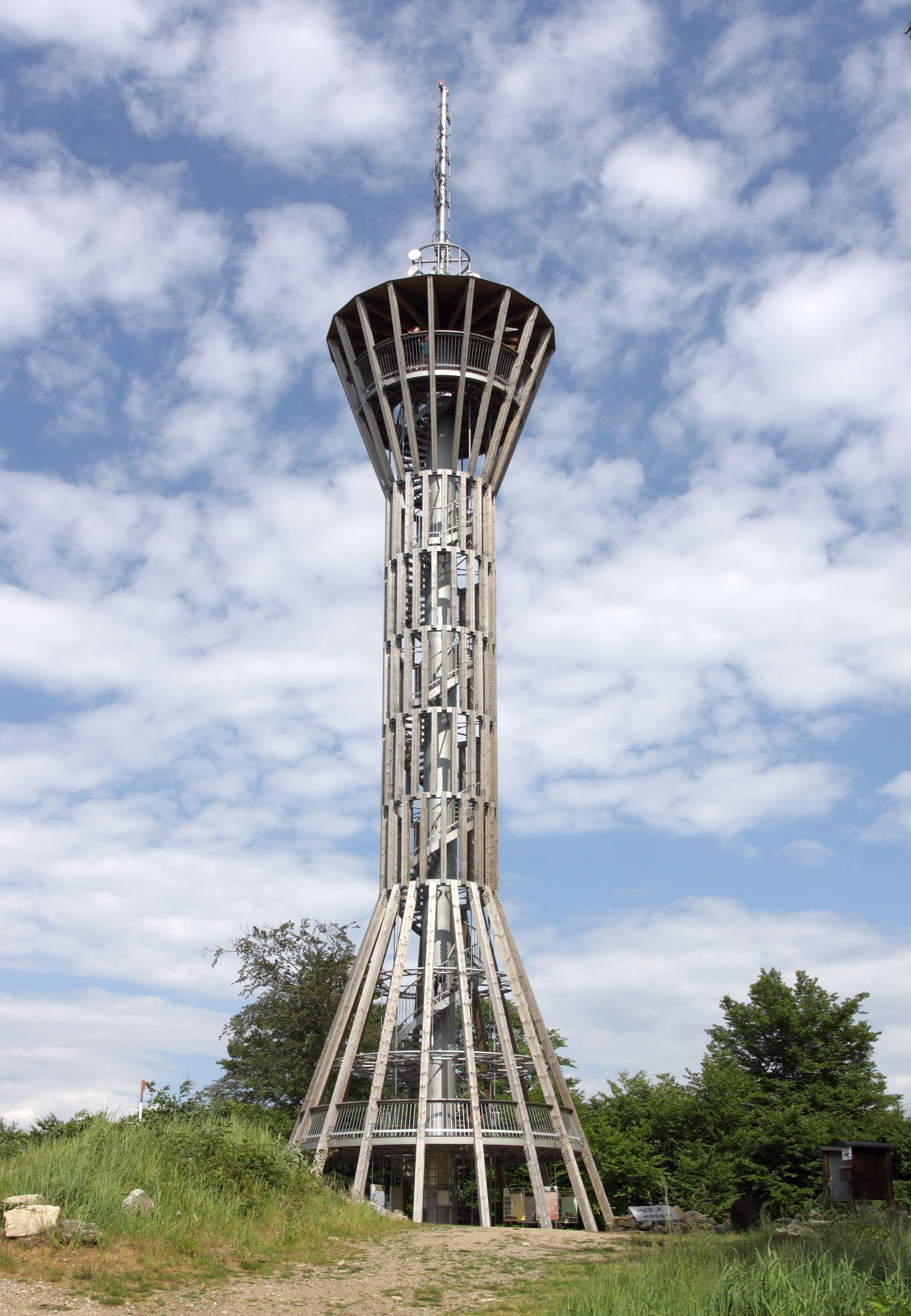 Lbosín - rozhledna Špulka.